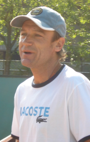 Mats Wilander à Roland-Garros en 2008